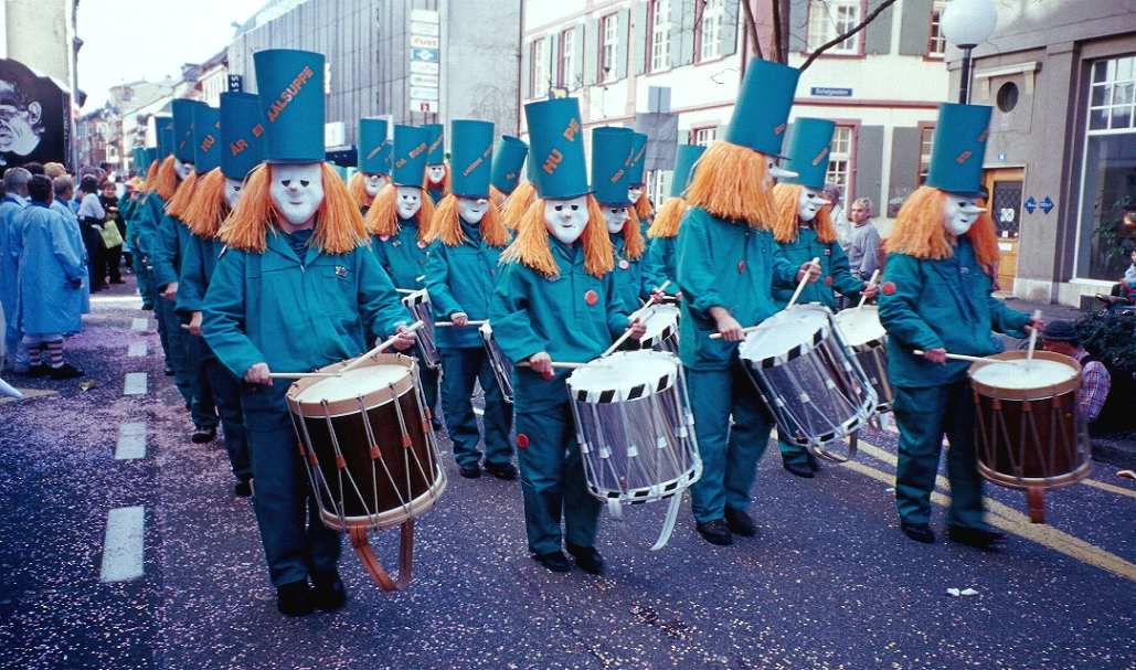 Muggedätscher, Basler Fasnacht